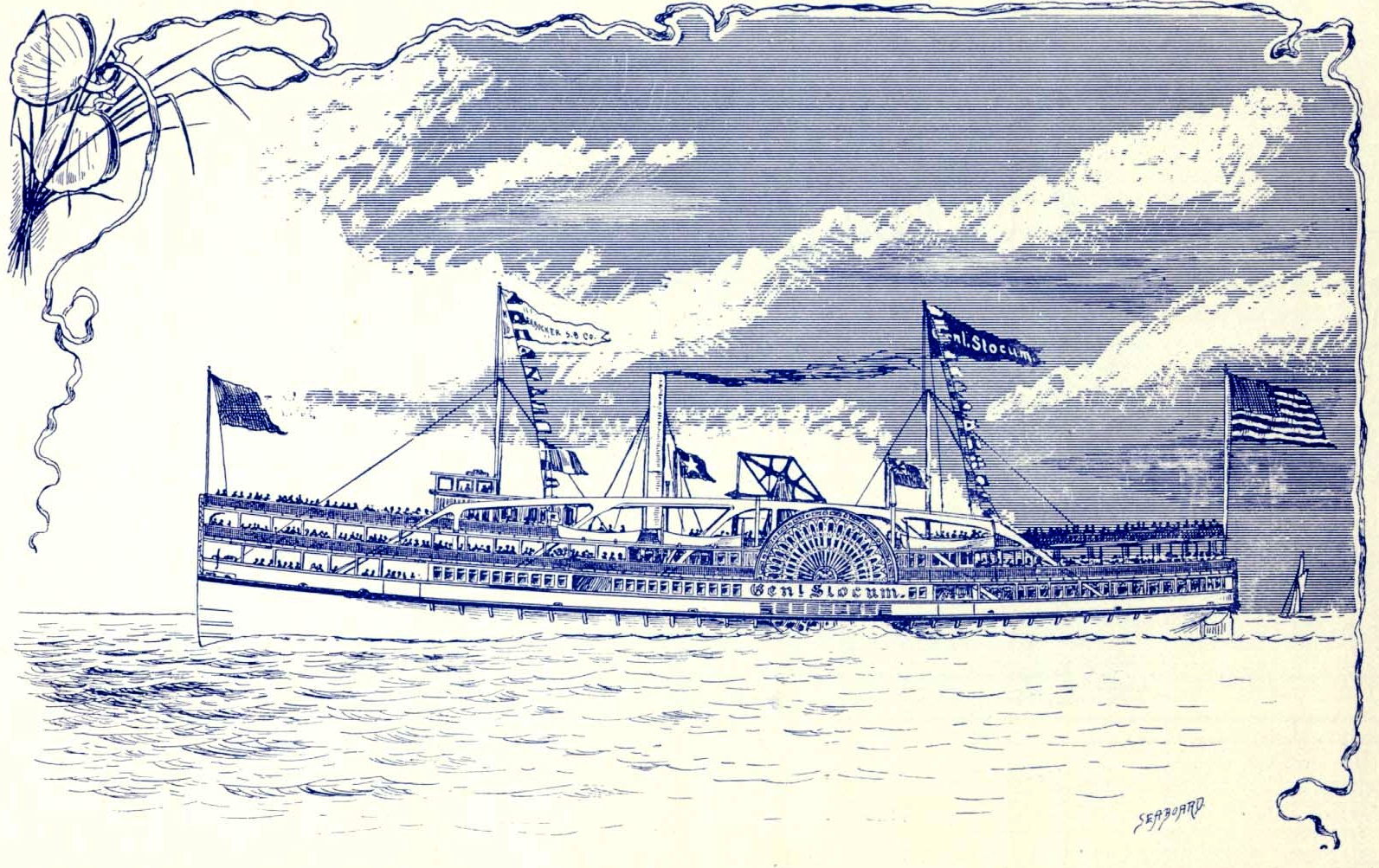 General Slocum large excursion steamboat